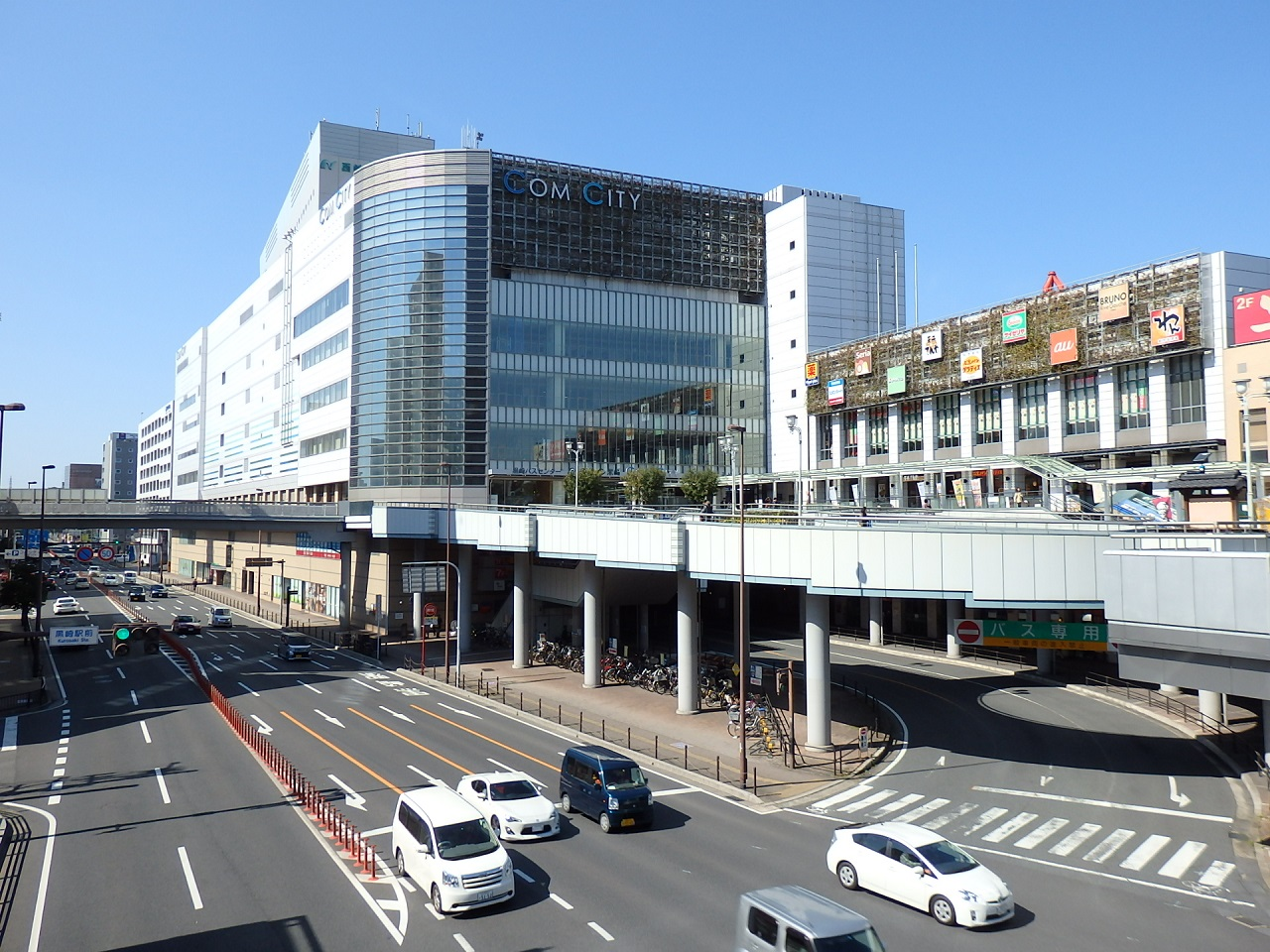 2017年2月、COMCITYを遠くから撮影。